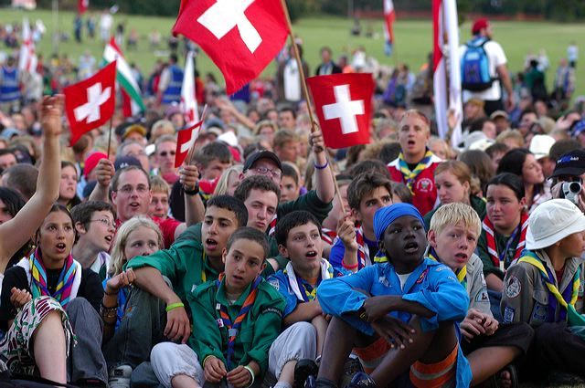 Scout provenienti da diverse nazioni cantano insieme la Lager-Song alla festa di chiusura dell'Eurojam 2005; Scouts coming from various nations sing at the European Jamboree 2005